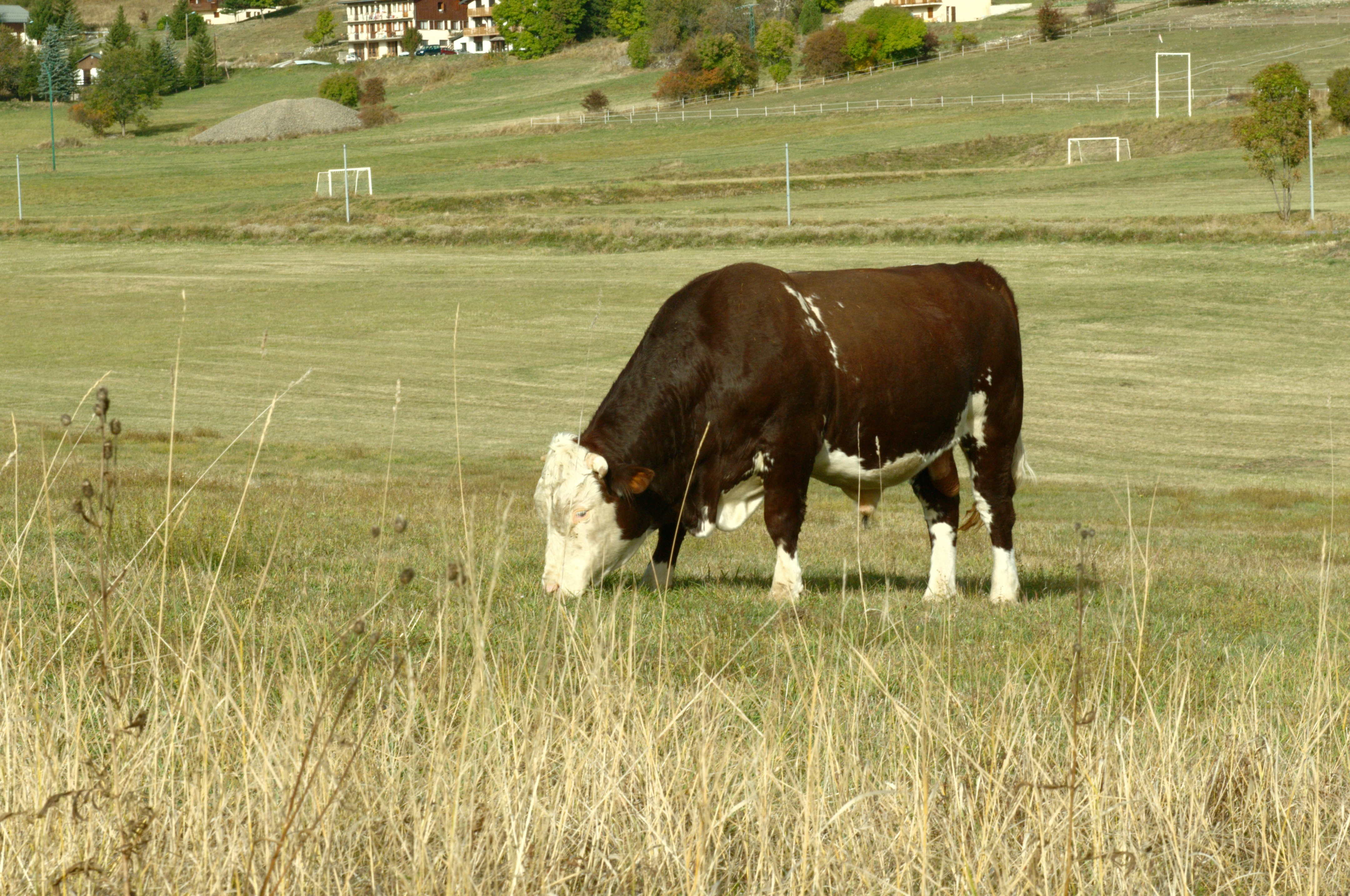 Taureau à Beuil